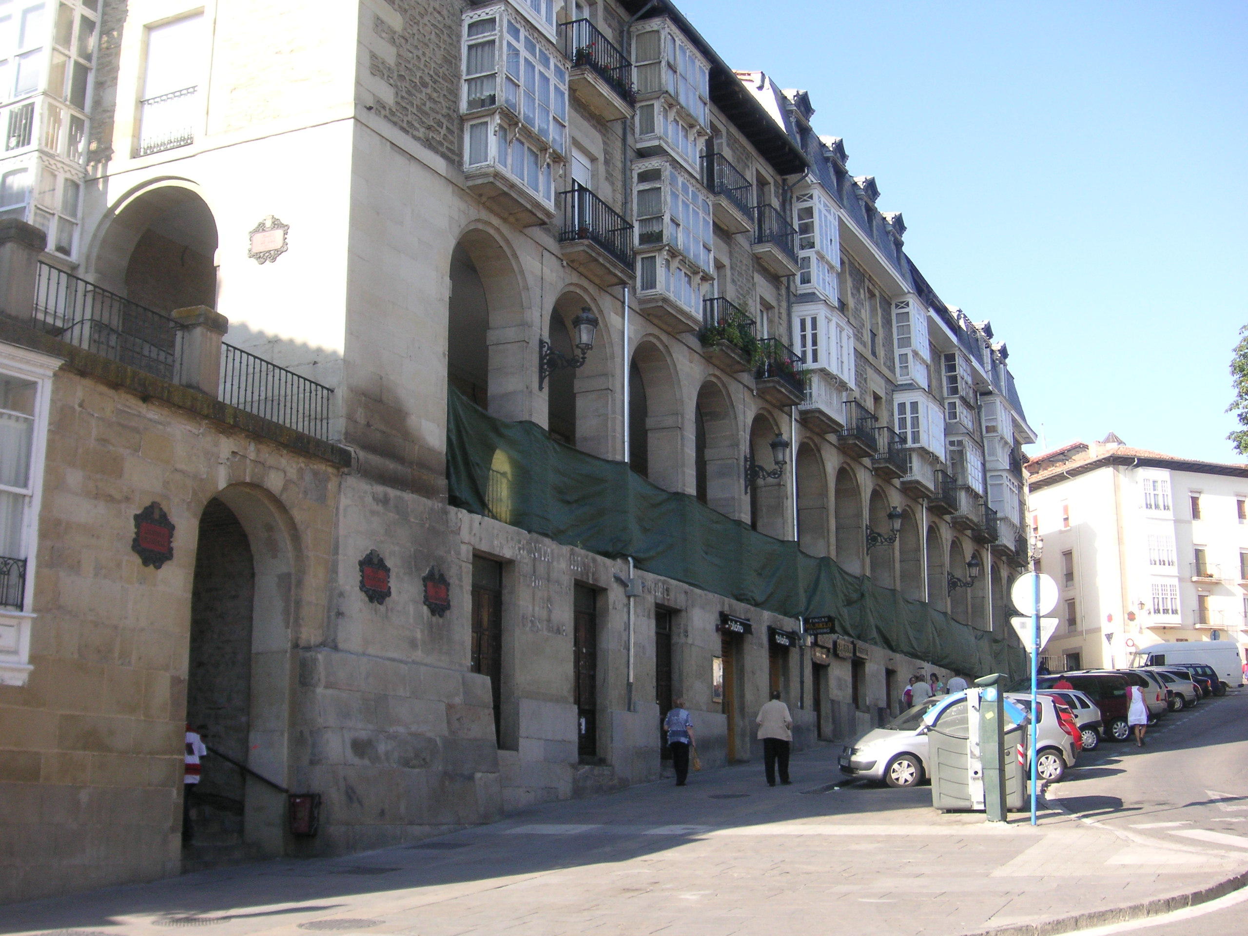 Los Arquillos, Vitoria-Gasteiz, País Vasco